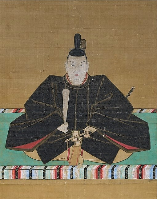 毛利吉元の肖像。